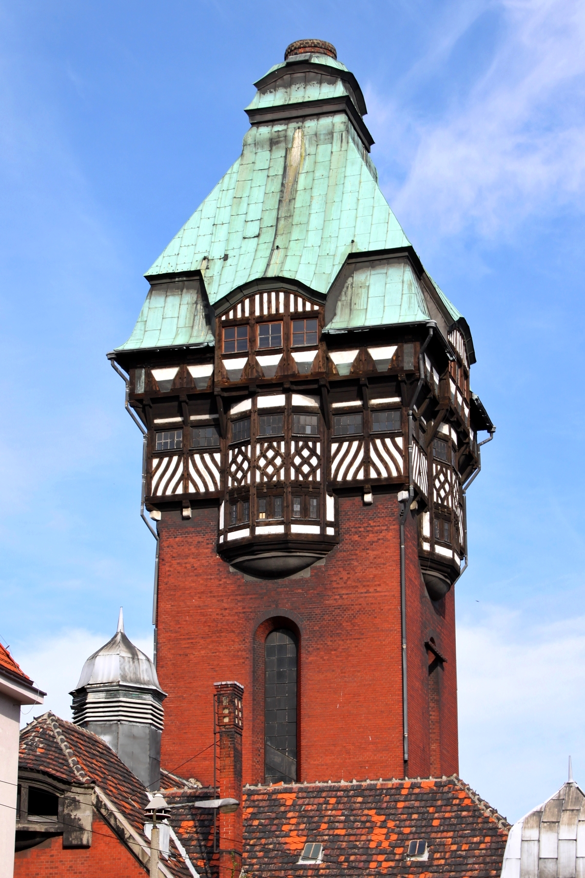 Wieża kominowa i ciśnień w zespole zabudowy Państwowego Szpitala Klinicznego nr 1 Zabrze, ul. 3 Maja 13-15, Zabrze 08.1990.